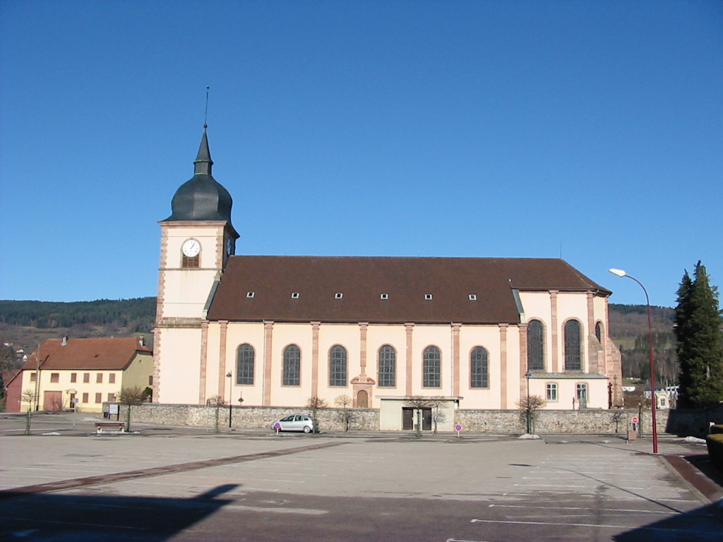 L'église de Fraize (Vosges, France)